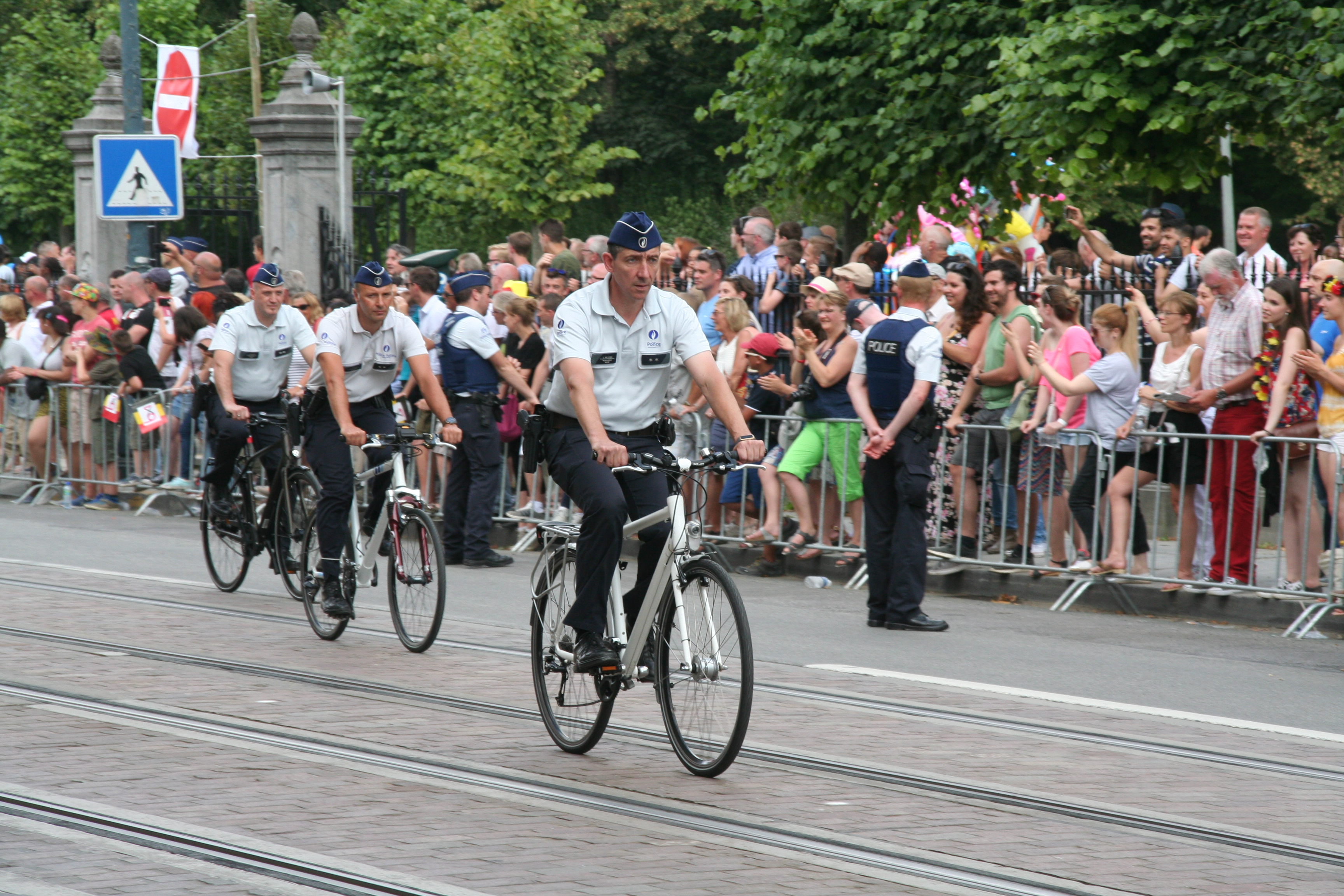 Fête nationale belge à Bruxelles le 21 juillet 2016- Policiers belges à vélo - Brigade cycliste